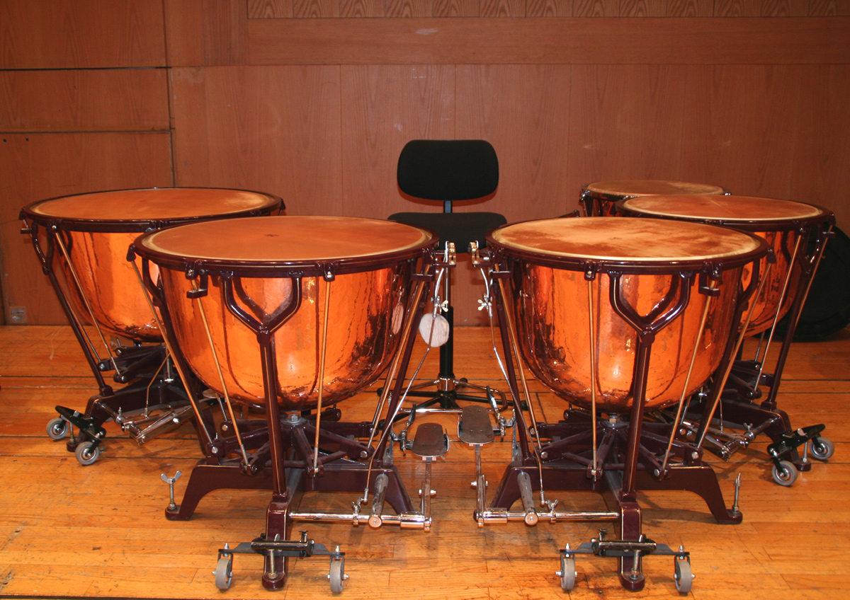 Orchester-Pauken der Firma Berliner Paukenwerkstatt/Wolfgang Hardtke